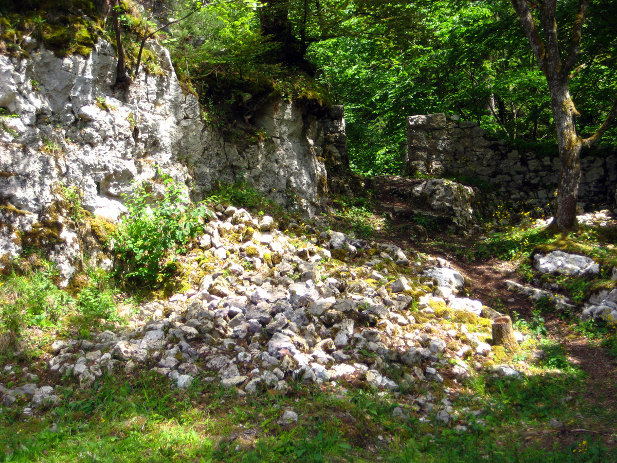 Burghof mit Turmschutt (im Vordergrund) und Tor (Hintergrund)